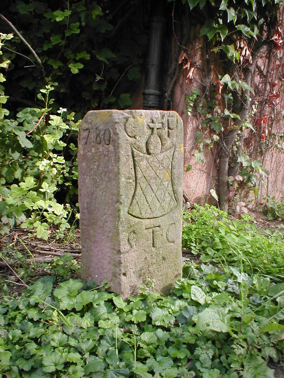 Markstein von 1780 in der Ortsmitte von Bargen (Helmstadt-Bargen, DE)